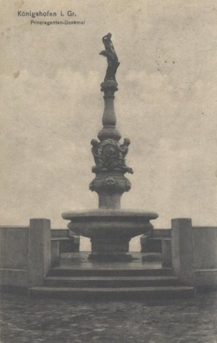 Balthasar Schmitt: „Luitpoldbrunnen“ (Prinzregenten-Denkmal) (1911); location: Market place in Bad Königshofen i. Gr. (Bavaria)